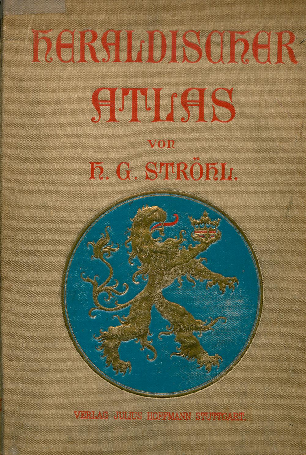 Hugo Gerhard Ströhl: "Heraldischer Atlas". Stuttgart 1899.